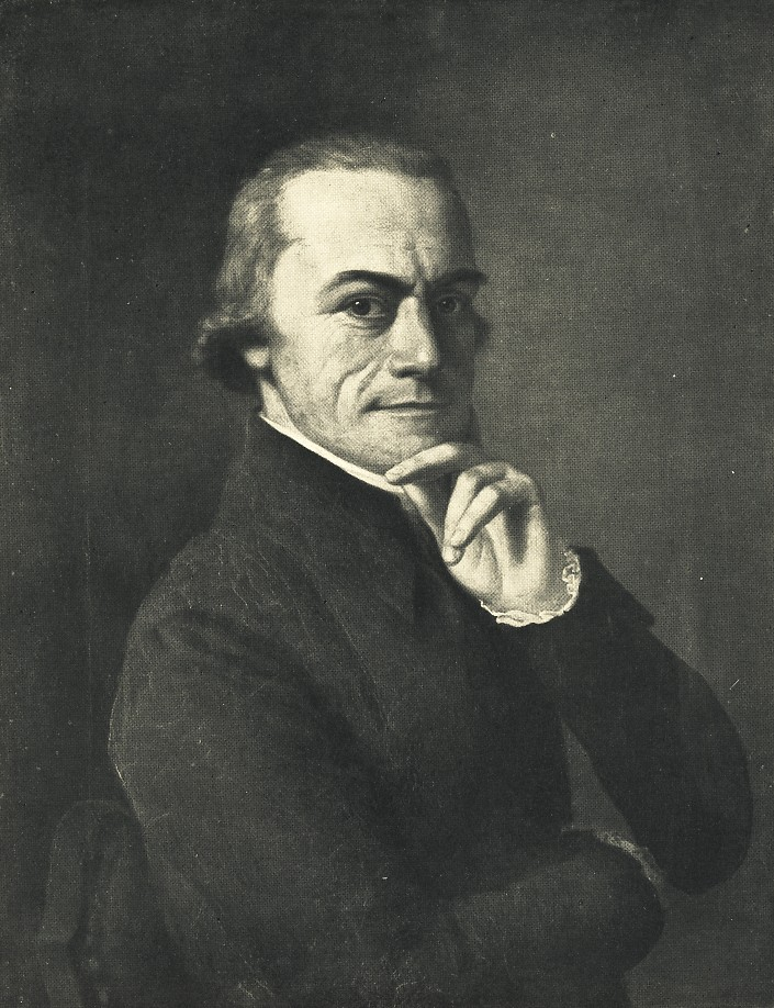 Portrait des Schriftstellers Lorenz von Westenrieder.